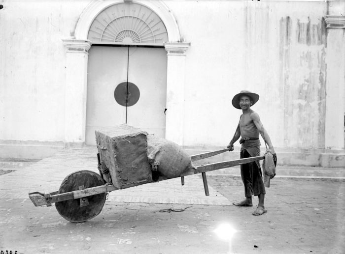 Negatief. De Billiton Maatschappij startte in 1860 de tinexploitatie op het eiland Billiton, voor de oostkust van Sumatra. Het eiland beschikte niet over goede wegen. Voor het transport van erts en andere goederen werd door de overwegend Chinese werklieden een kruiwagen gebruikt die men piepkar noemde, vanwege het jankend geluid van de ongesmeerde as. De kruiwagens werden via ijzeren kruirails, die sinds 1884 de mijnen verbonden met de hoofdplaatsen, voortgeduwd. Dit gaf een betere geleiding van het wiel dan de vaak modderige bodem. Rond 1920 was de piepkar aan het verdwijnen door de aanleg van goede wegen en smalspoorrails. (P. Boomgaard, 2001). Chinese kruiwagen, z.g. piepkar